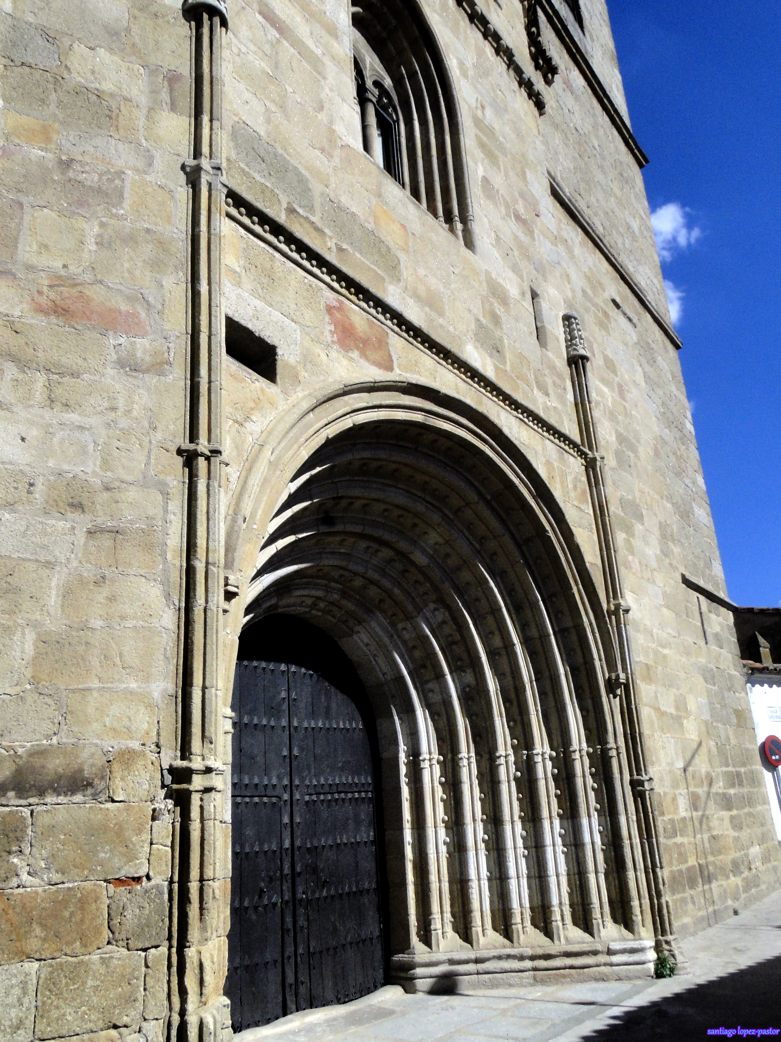 Iglesia de Santa María de la Consolación, Garrovillas de Alconétar, provincia de Cáceres, España.